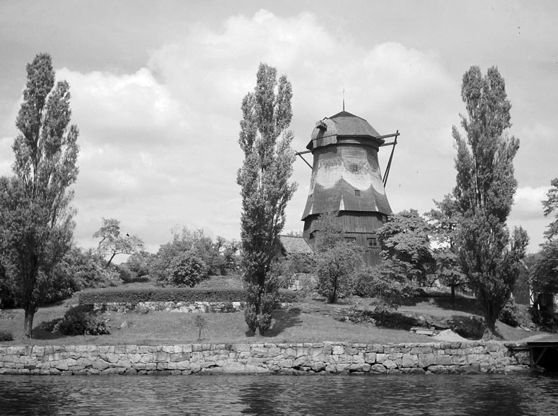 Waldemarsuddes oljekvarn 1948